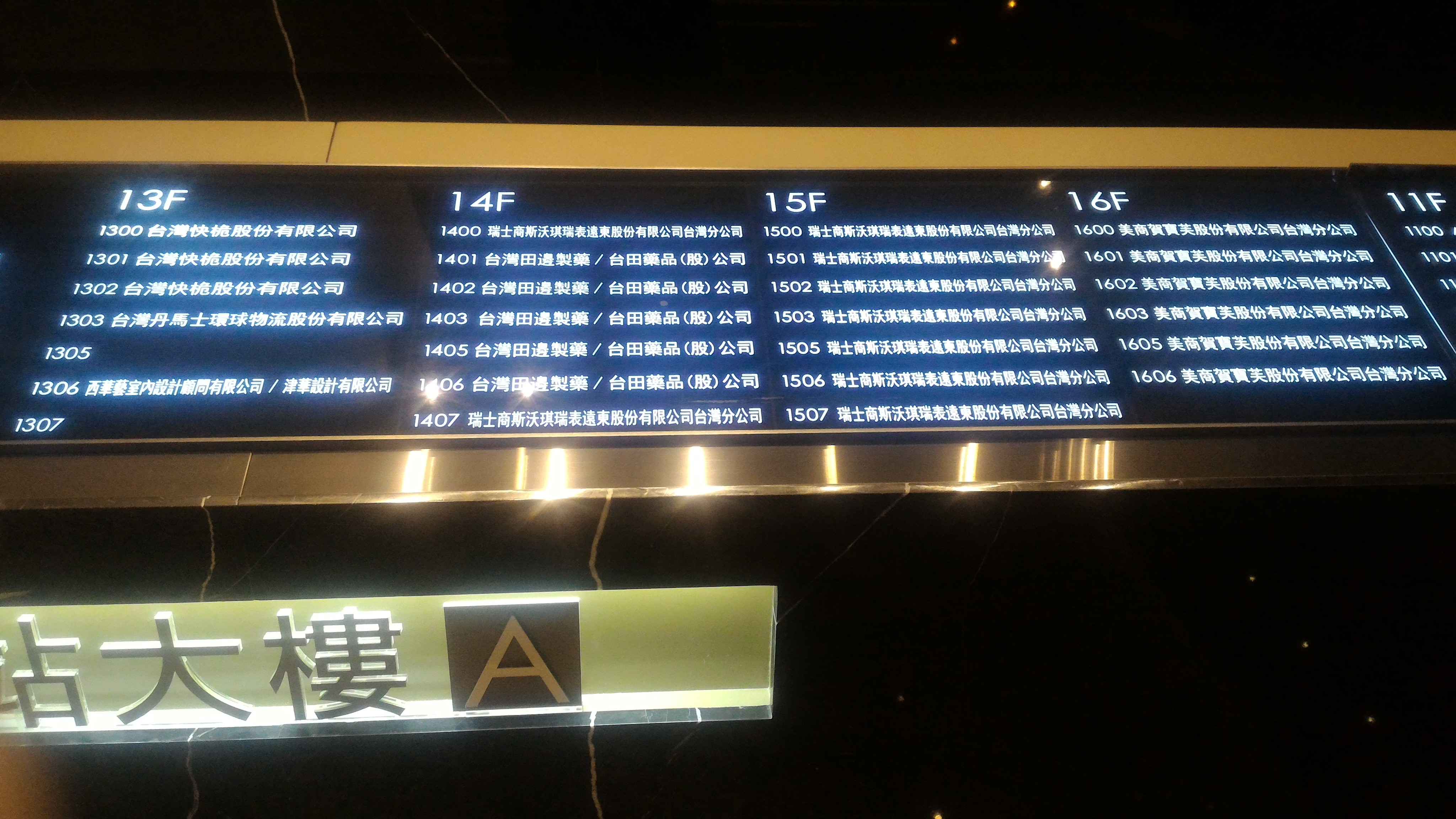 潤泰松山車站大樓A棟13到16樓公司行號牌。